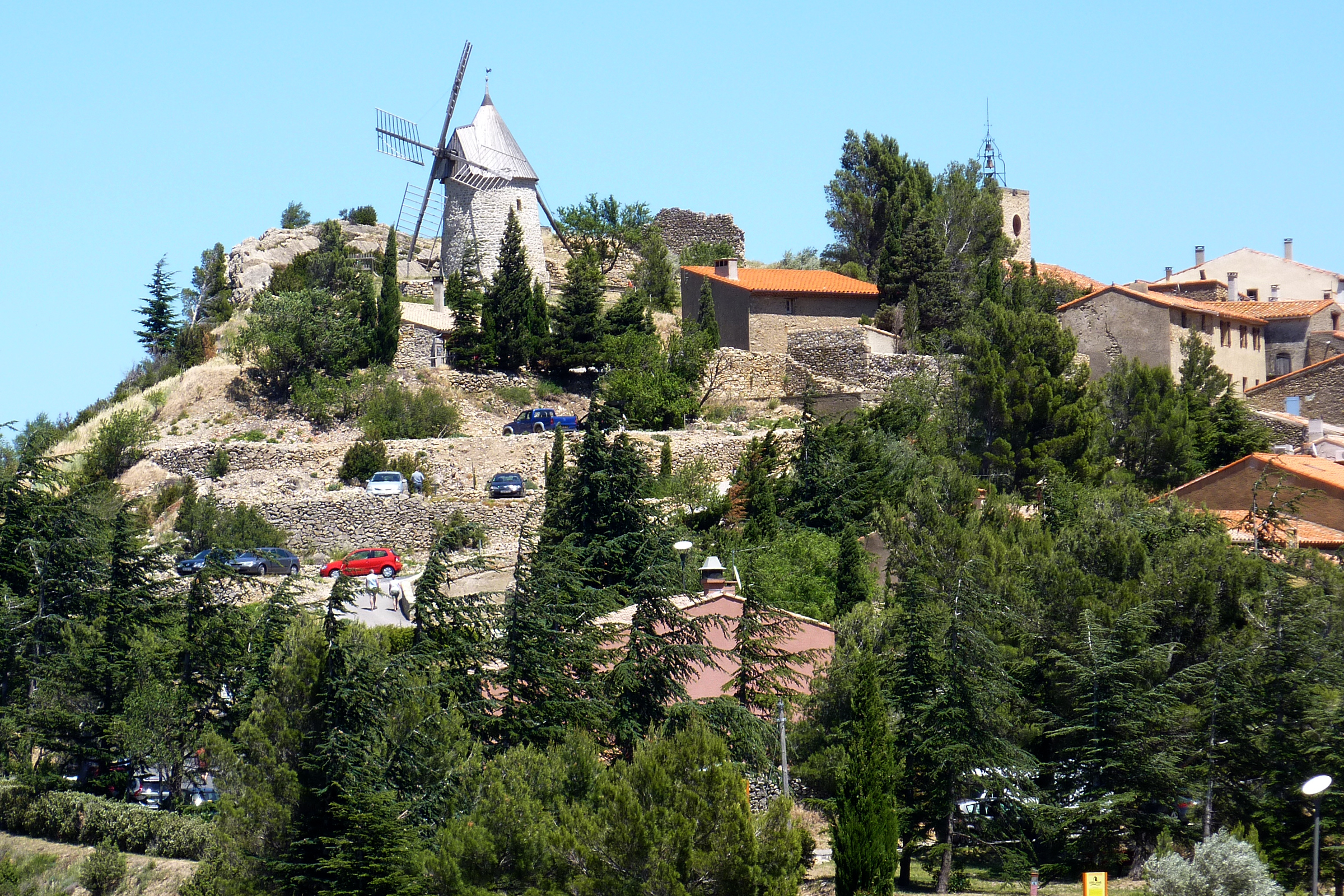 Cucugnan (Aude, France) : vue générale du village